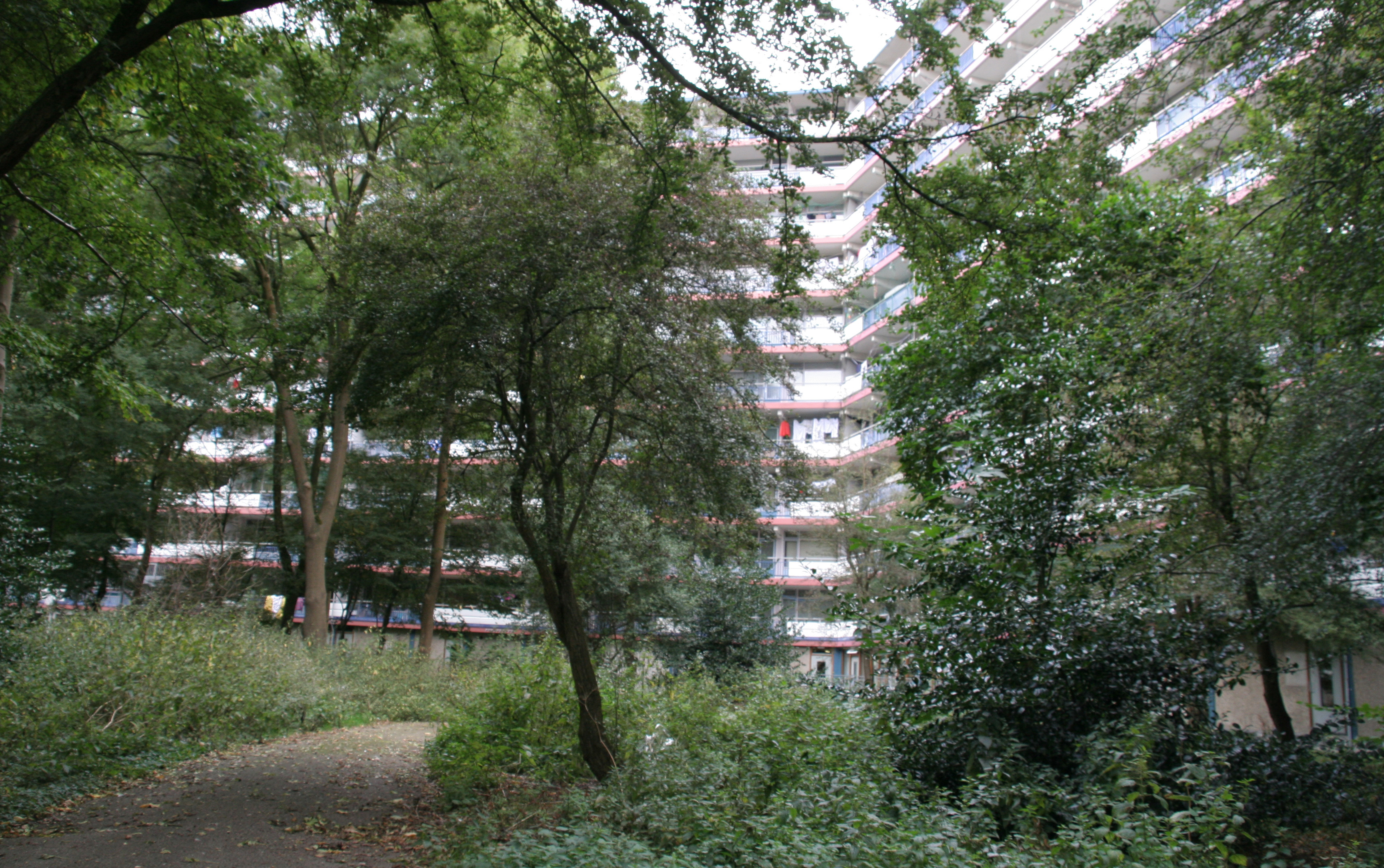 Bijlmermeer, flat Kikkenstein. Slecht verlichte paden.